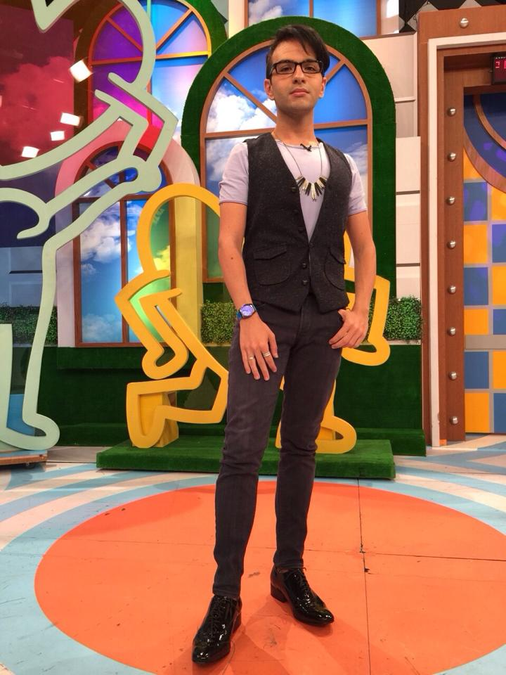 韋佳德參加中天綜合台《康熙來了》錄影。